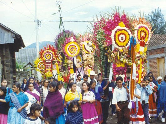 Recepcion Arzobispo Casanova